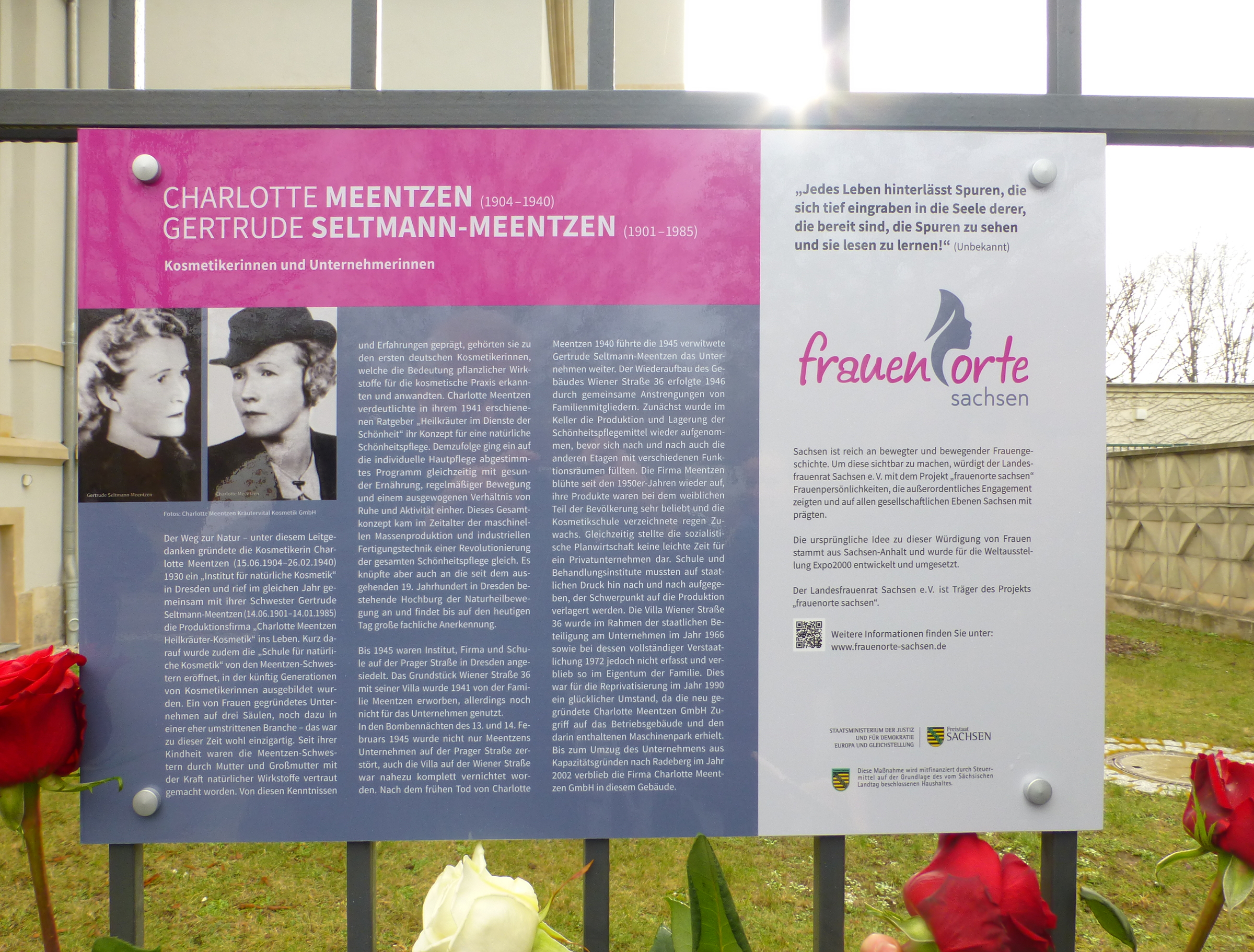 Ehrentafel für Charlotte Meentzen und Gertrude (eigentlich Gertrud) Seltmann-Meentzen, eingeweiht am 26. Februar 2020 (80. Todestag von Charlotte Meentzen) an der ehemaligen Meentzen-Villa Wiener Straße 36 in Dresden.